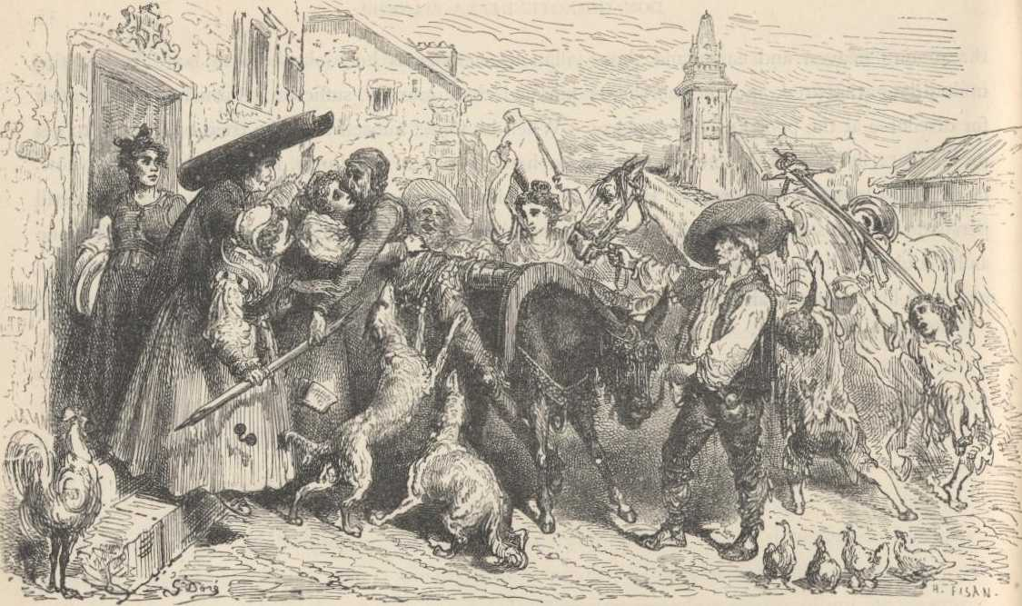 "Dom Quixote chega a casa" ilustração por Gustave Doré para “Don Quixote“ de Miguel de Cervantes.